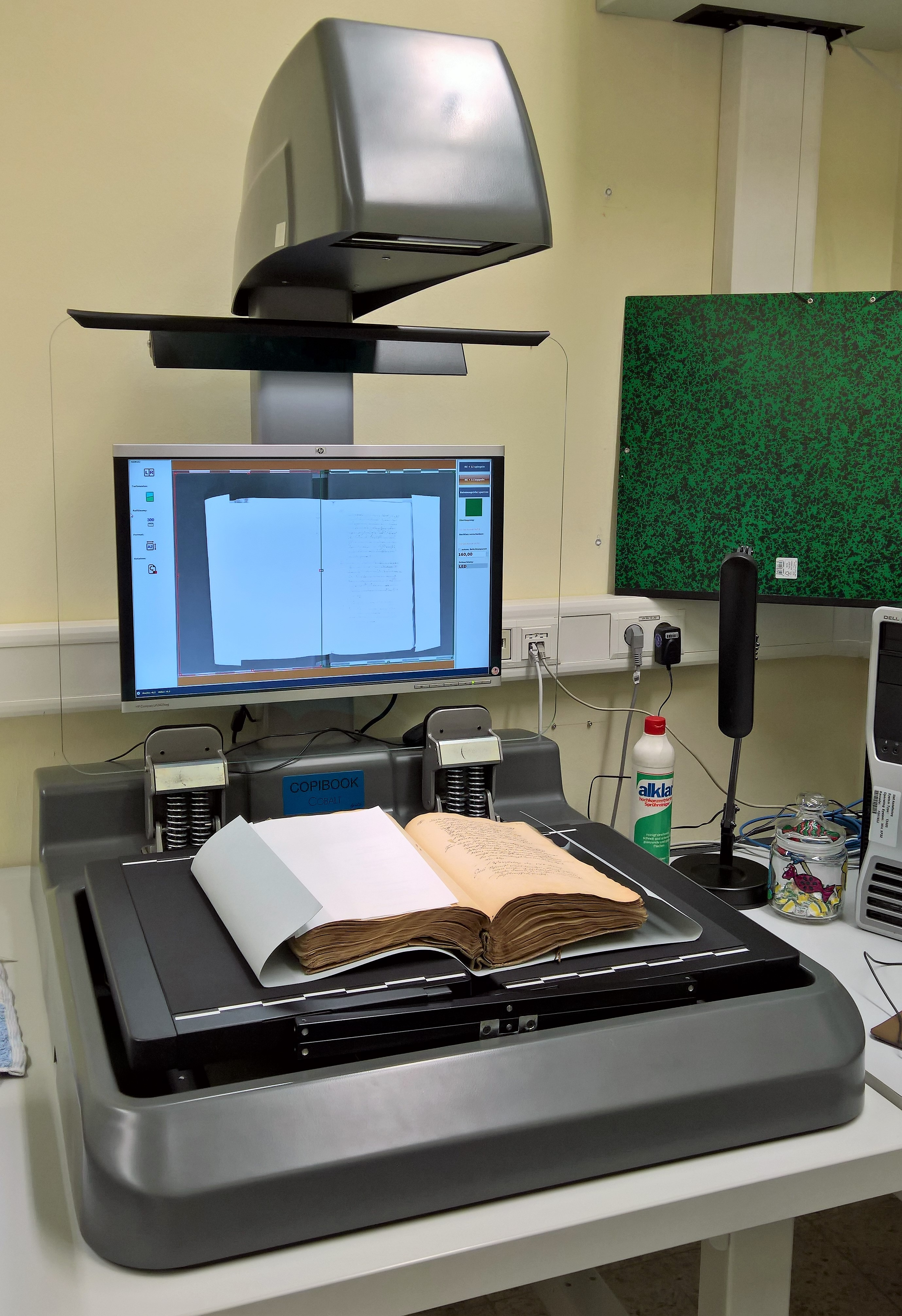 Der Buchscanner im Stadt- und Stiftsarchiv Aschaffenburg, Zentralteil